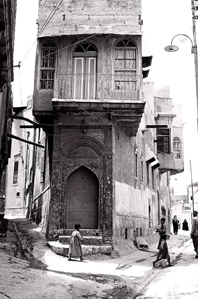 بيت خضر افندي اسبير المعلم في المدرسة الخالدية في الموصل شمال العراق، قرب قهوة السويدية (بيت المستنطق) يونس جودة الرمضاني ويقع البيت على بعد خطوات من مدخل سوق الشعيغين الى باب النبي، الصورة التقطت في صيف عام 1968 والفرع الثاني الى اليسار يذهب الى بيت حجازي الأثري